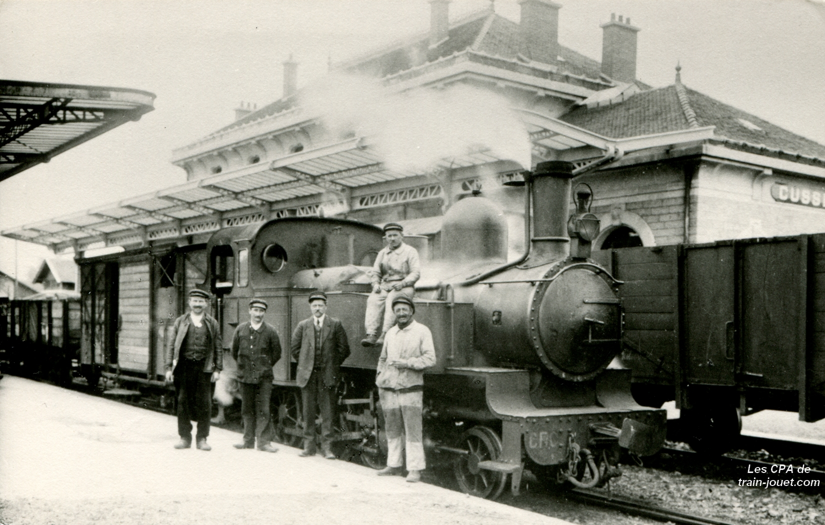 Cusset, Société des Chemins de fer du Centre, type 130T, Decauville, série 50 à 54